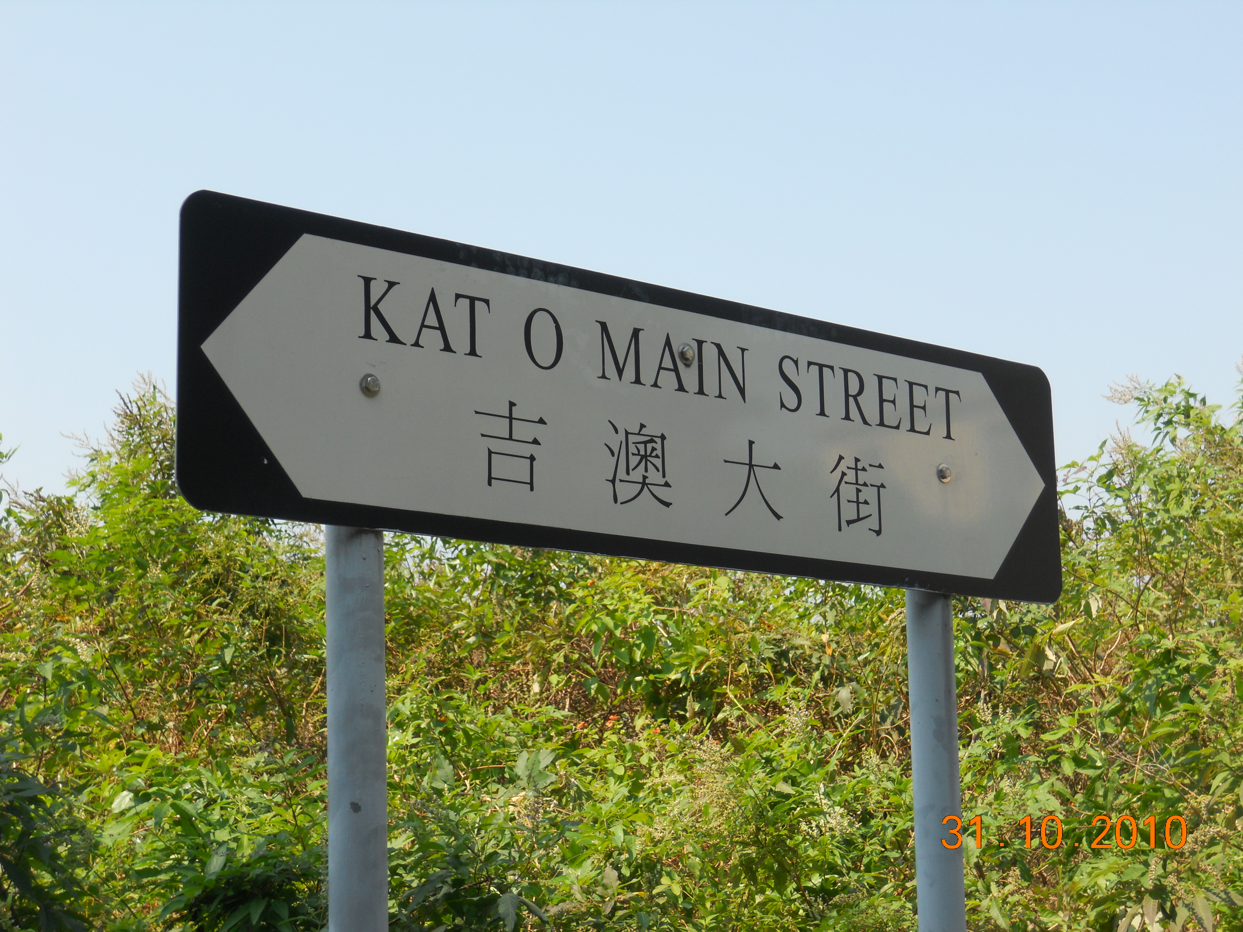 吉澳大街路牌